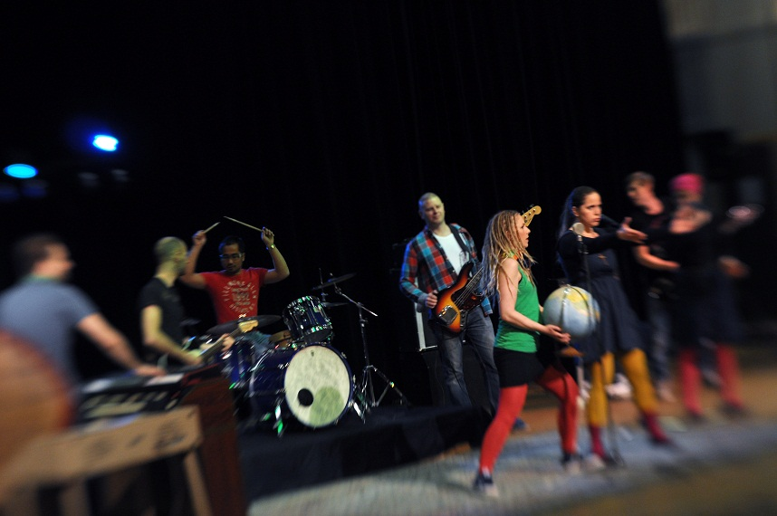 Akosia vid inspelningen av musikvideon till "Burn up"